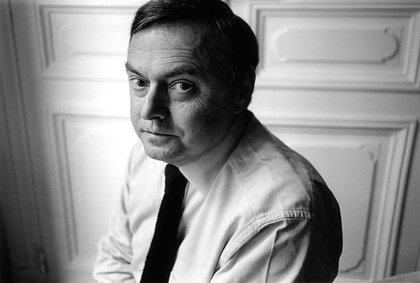 Pierre Bourdon by Guillaume Luisetti